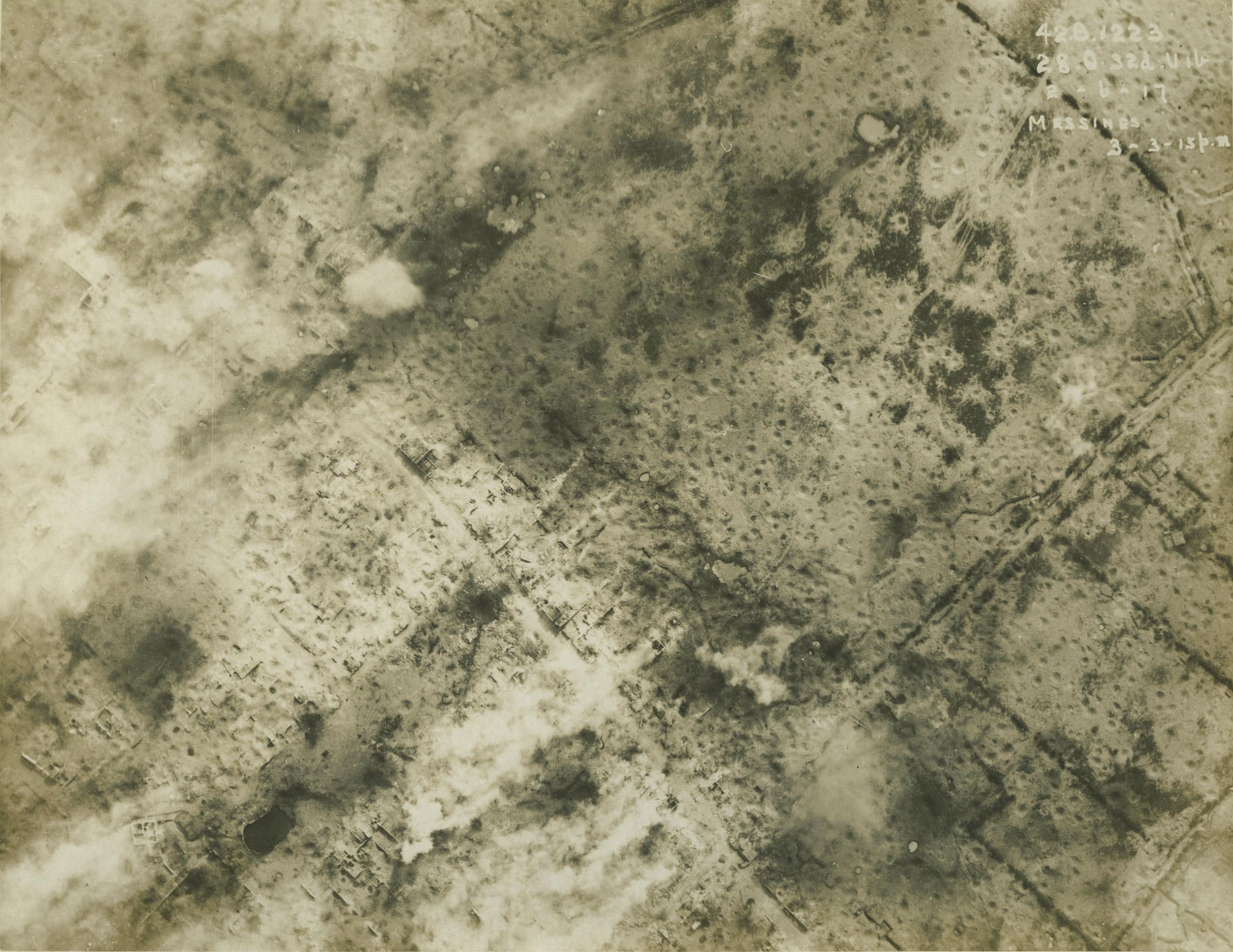 MESSINES